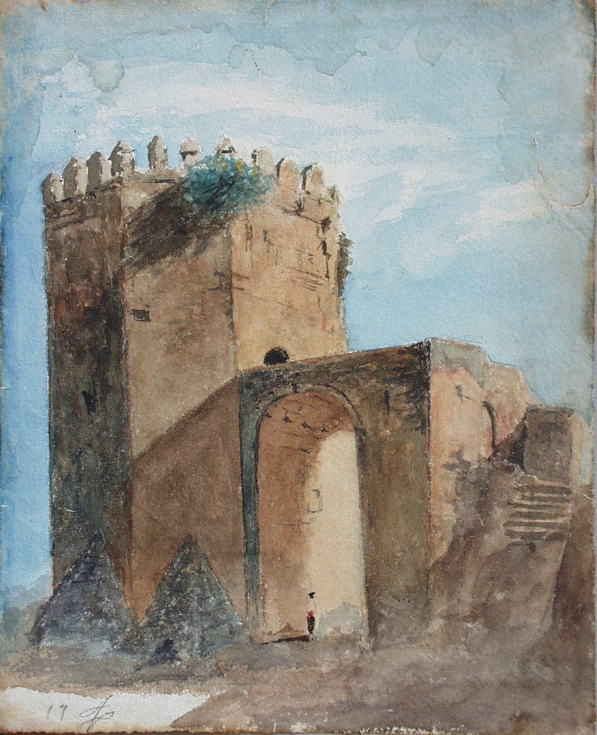 La obra representa la Torre de la Malmuerta, que comenzó a construirse en 1404, durante el reinado de Enrique III de Castilla, y que terminó de edificarse en 1408, durante el reinado de Juan II de Castilla. La torre está situada en la ciudad de Córdoba, (España).